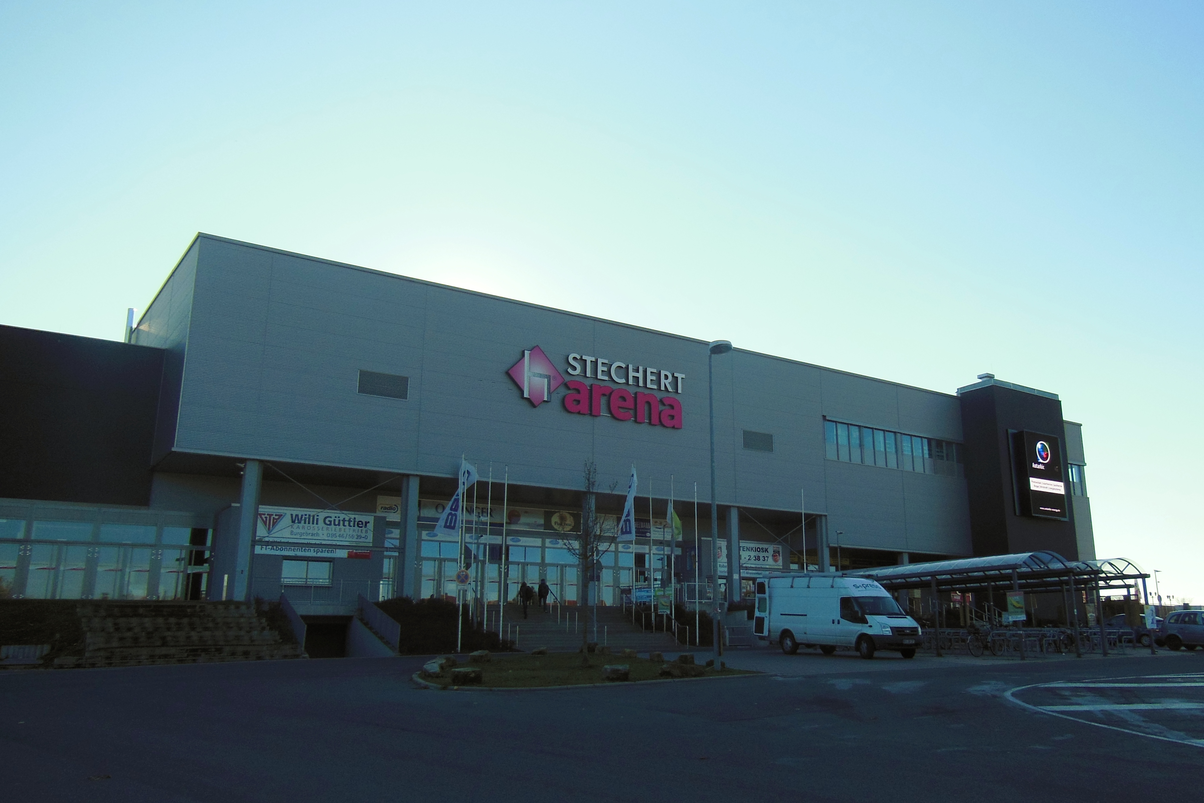 Außenansicht Stechert Arena Bamberg